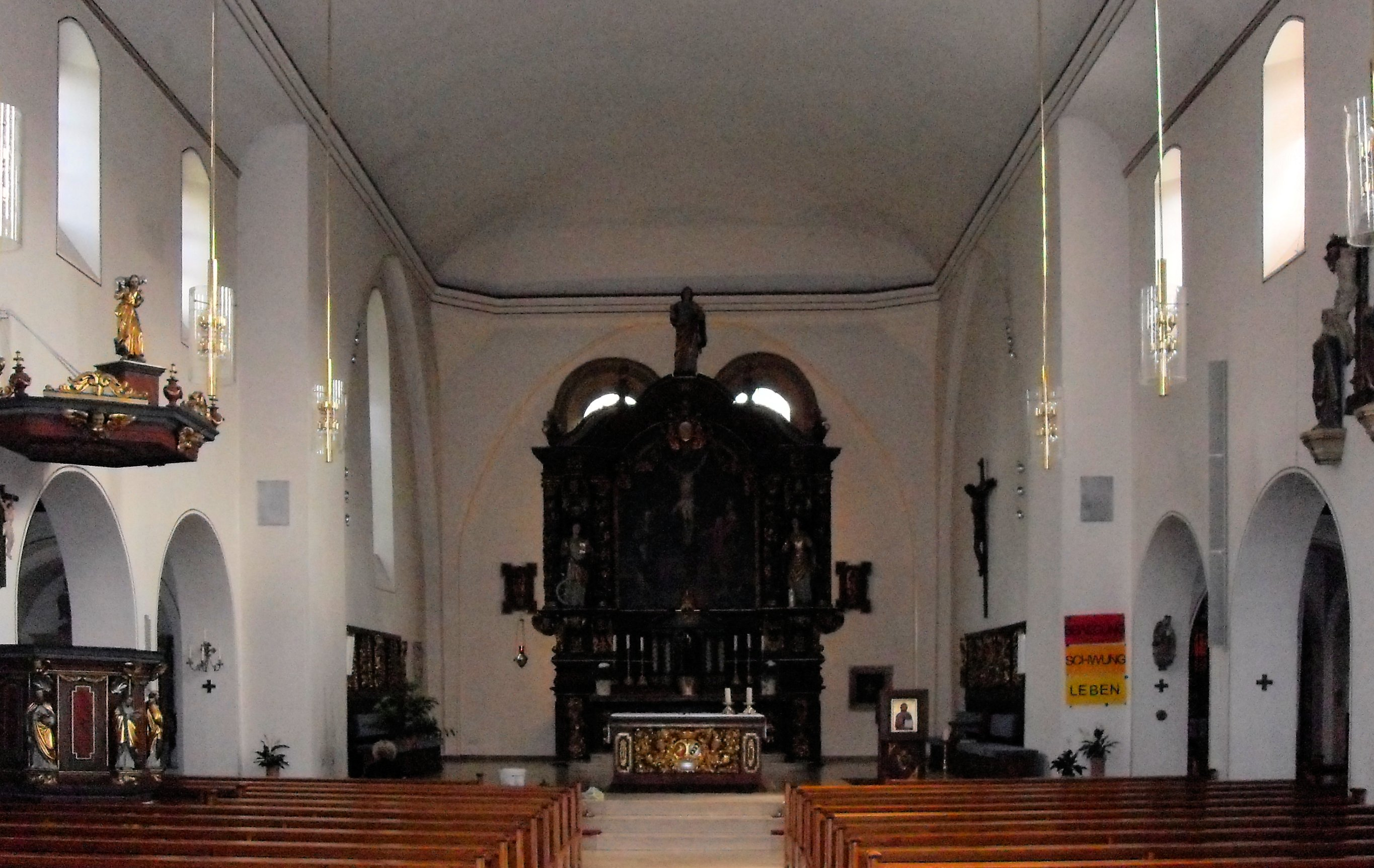 Innenansicht der Stiftskirche in Wietmarschen, Landkreis Grafschaft Bentheim